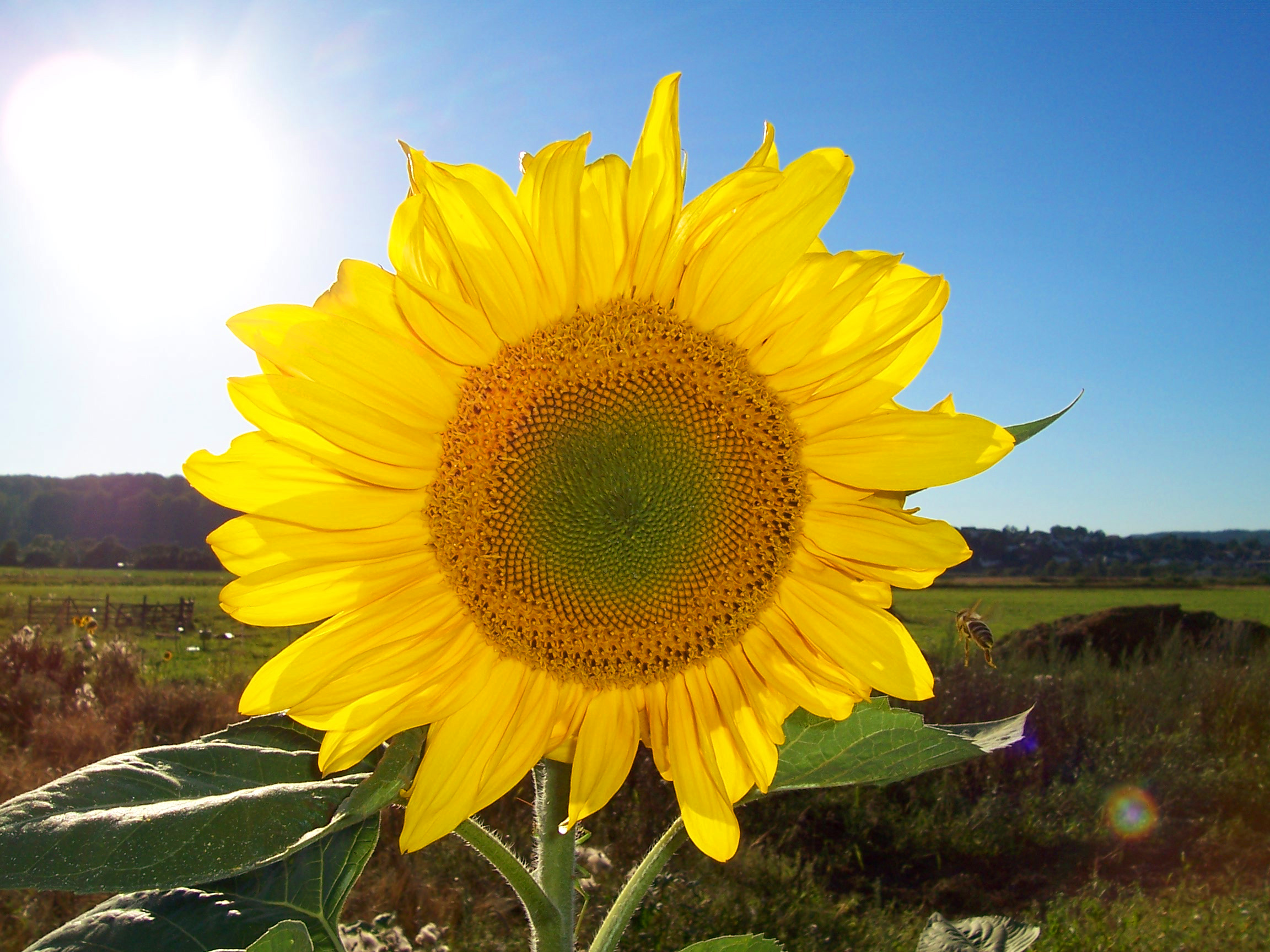 Sonnenblume (Common Sunflower, Helianthus annuus), Blüte